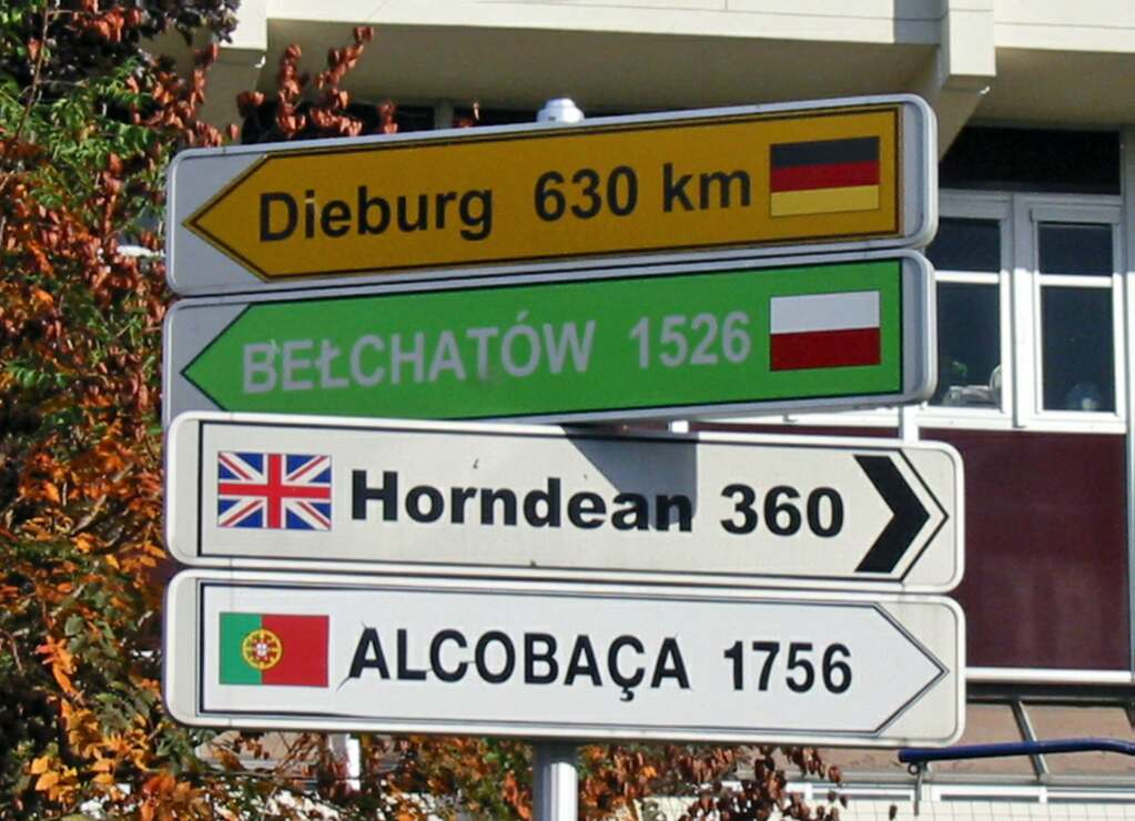 Aubergenville (Yvelines) panneau indiquant les villes jumelées Photo JH Mora, octobre 2005